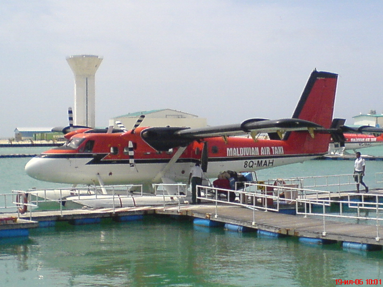 Де Хиввеленд 6